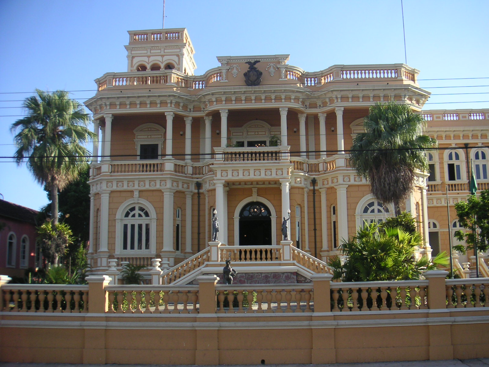 Das Bild zeigt den Palacio Rio Negro in Manaus.